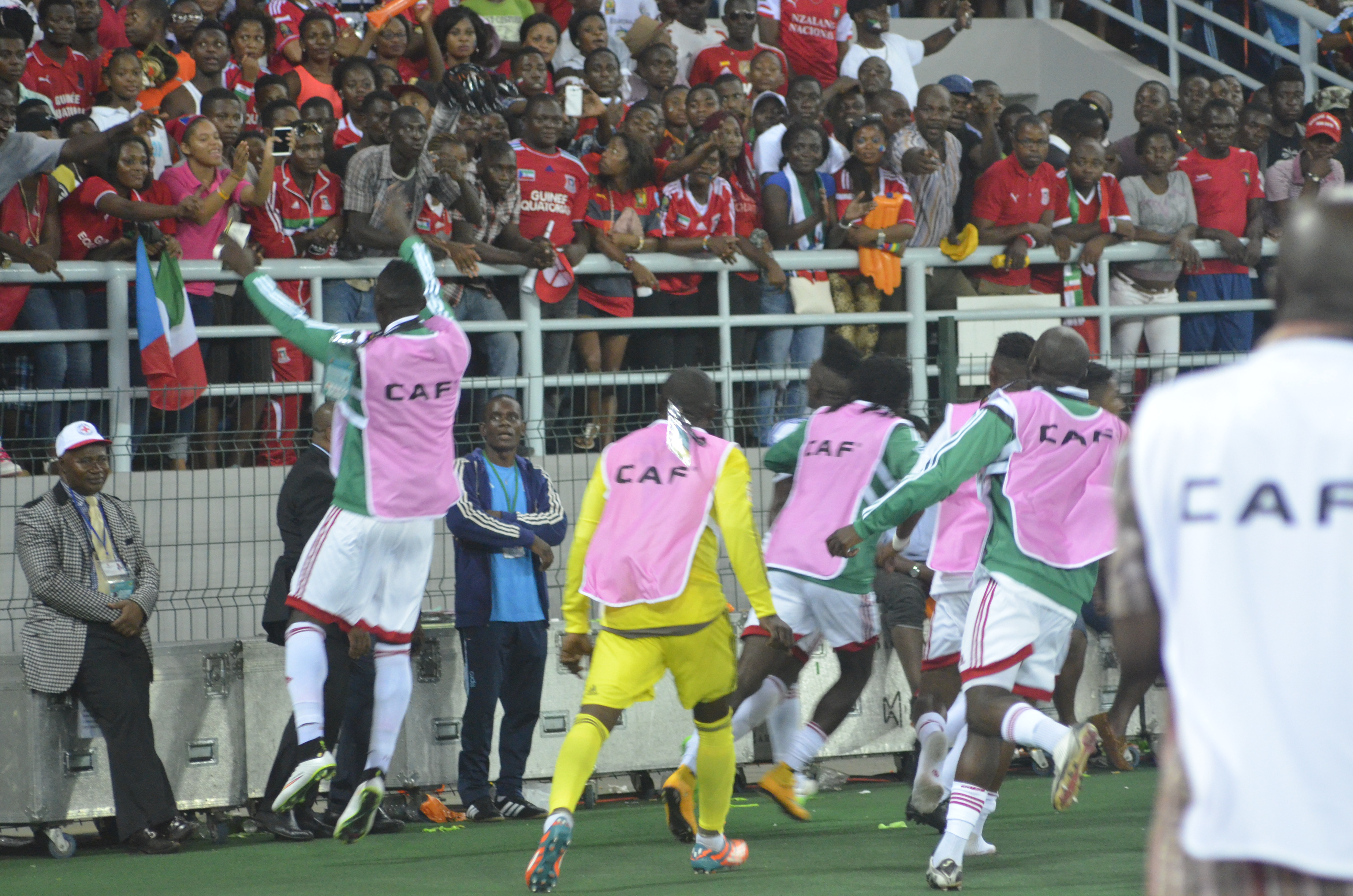 Célébration d'un but pendant la Coupe d'Afrique des Nations en 2015 par l'équipe du Congo This is an image from Cameroon